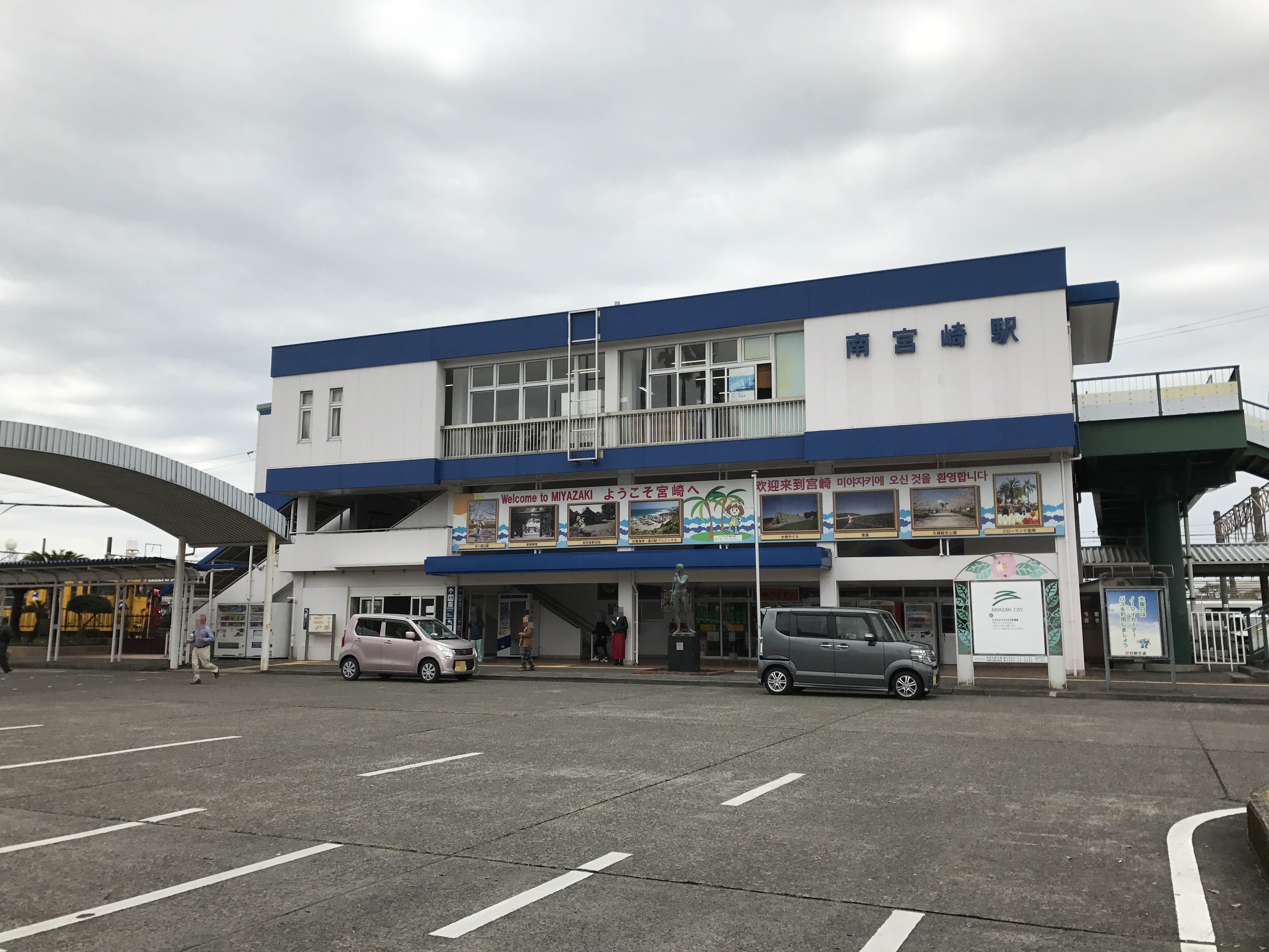 南宮崎駅駅舎